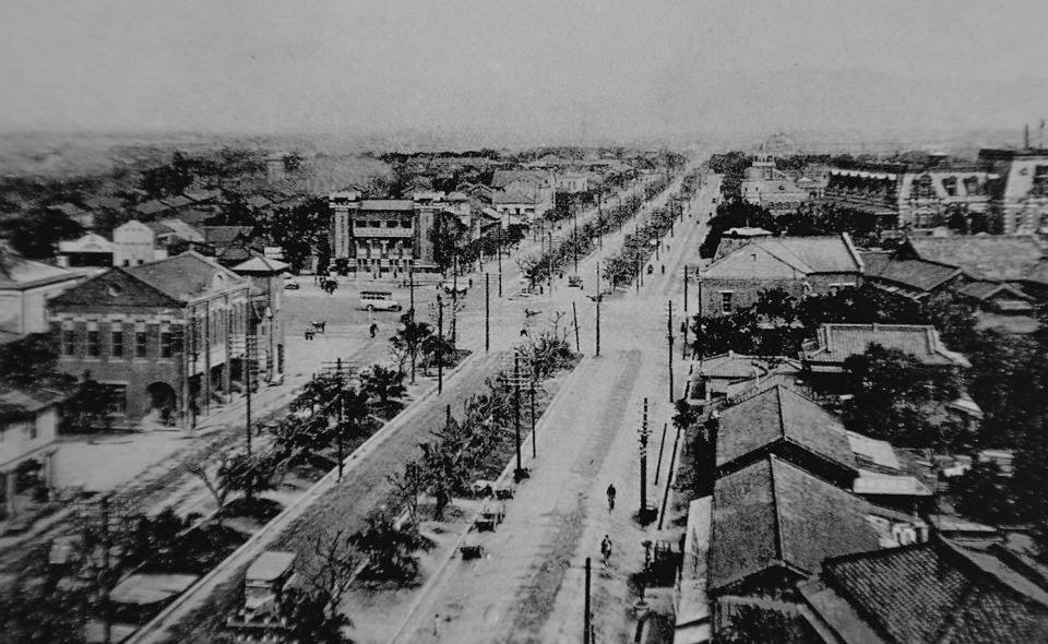 中文（台灣）: 日治時期台北三線路舊照片 Bân-lâm-gú: Sam-suànn-lōo